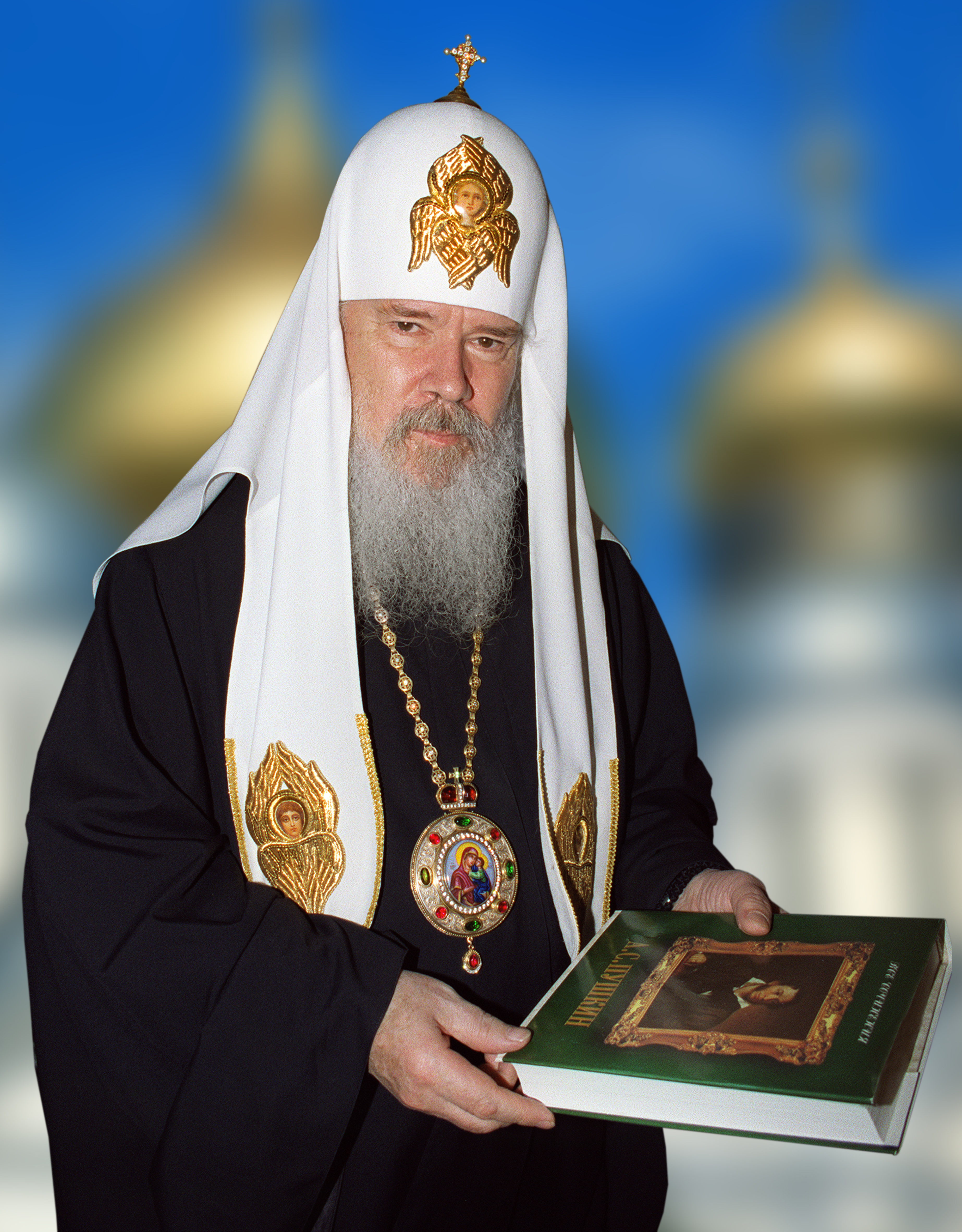 Святейший Патриарх Московский и всея Руси Алексий II на открытии III Всемирного Русского Народного Собора (4 декабря 1995 года) сказал: «В наше время, говоря словами Пушкина, "новорожденная свобода, вдруг онемев, лишилась сил". В связи с этим особо напомню, что ныне русскому обществу недостает подлинной соборности, то есть такого состояния, когда бы мы — какими бы разными ни создал нас Творец — вдохновенно работали на общее благо, воспринимая любой труд как служение Господу и Отчизне, помня каждый час и каждую минуту, что мы несем ответственность пред Богом за нашего ближнего, за нашу семью, за наш народ, за нашу Родину, за мир и благополучие всего мира».